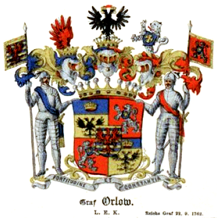 Герб графа Орлова